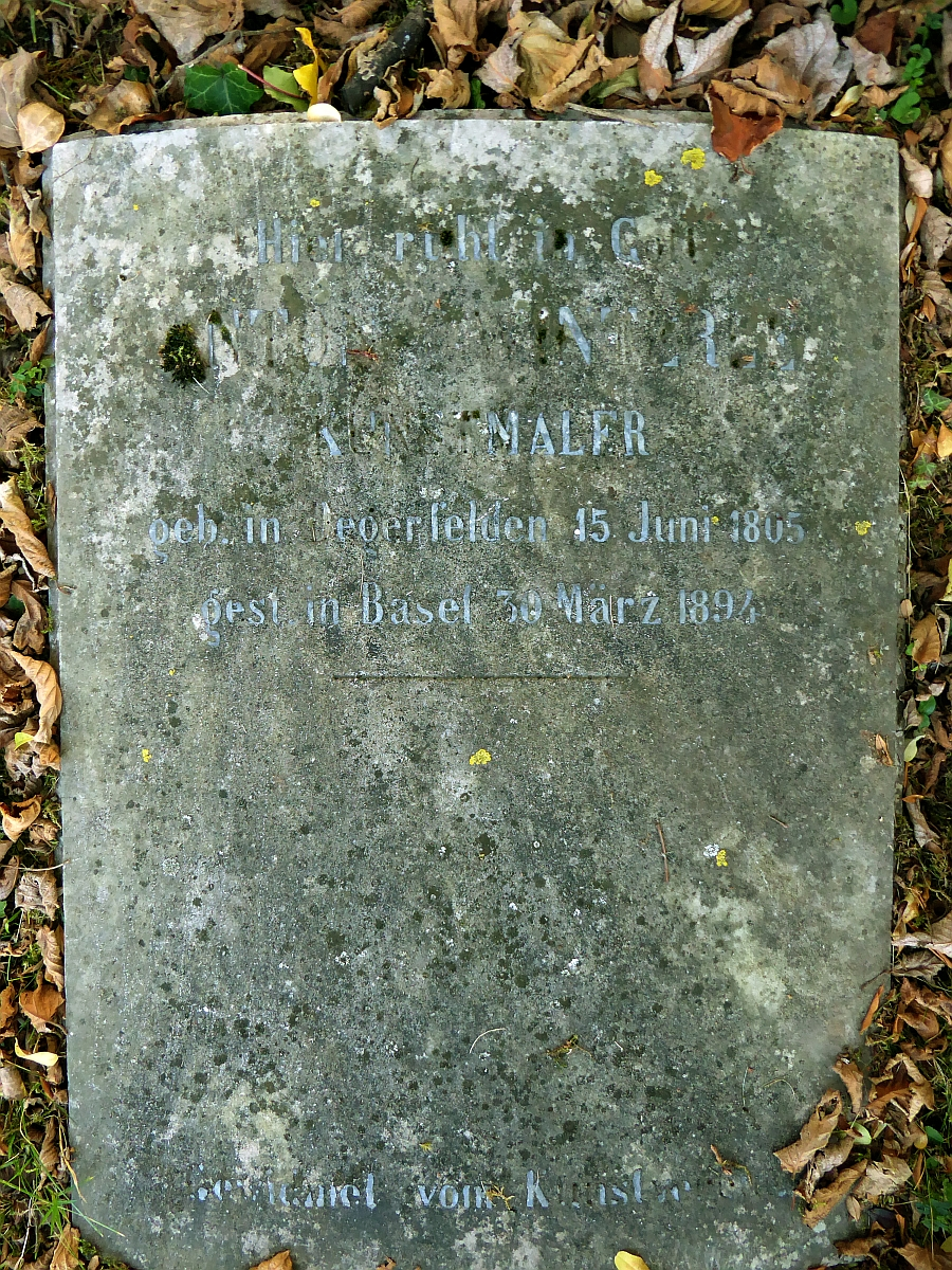 Anton Winterlin (1805–1894) Kunstmaler, Grab auf dem Friedhof Wolfgottesacker, Basel